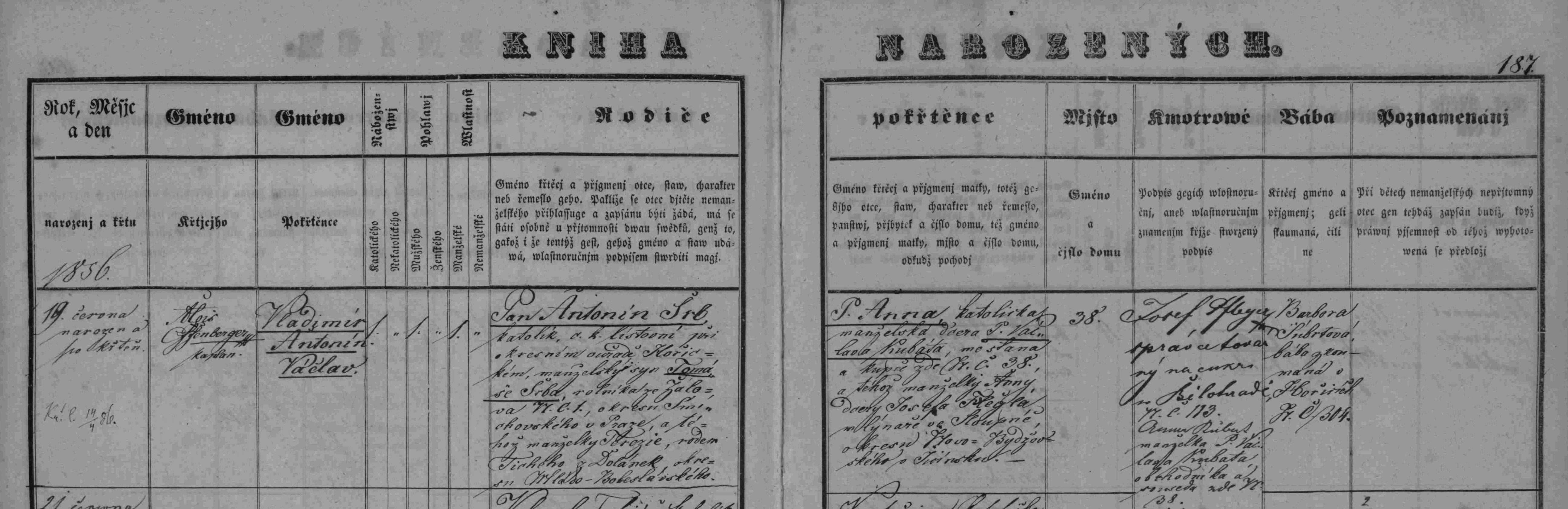 matriční zápis o narození Vladimíra Srby (matrika N 1852-1859 Hořice (SOA Zámrsk))